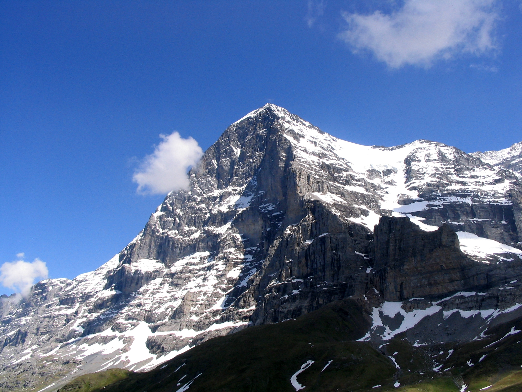 Eiger (3.970 m, Bernese Alps, North-west side), view from Kleine Scheidegg